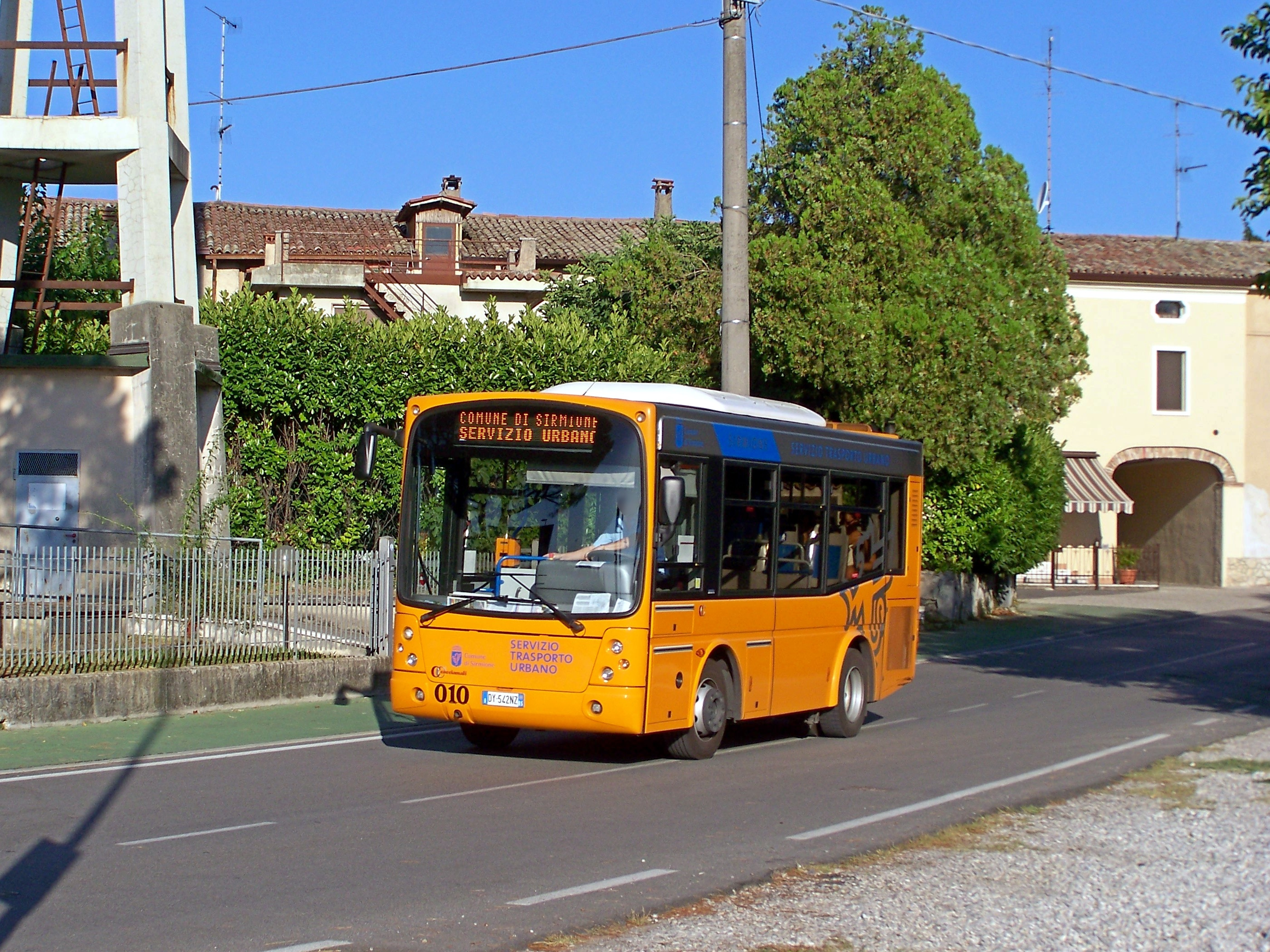 Il Cacciamali Grifone nr. 010 del comune di Sirmione mentre espleta servizio nella localita' Rovizza